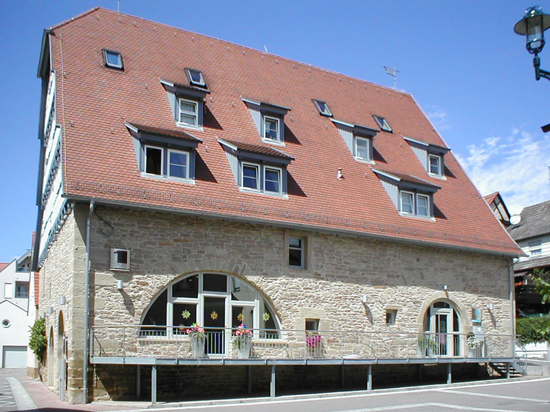 Gemminger Kelter in Bönnigheim, erbaut um 1600